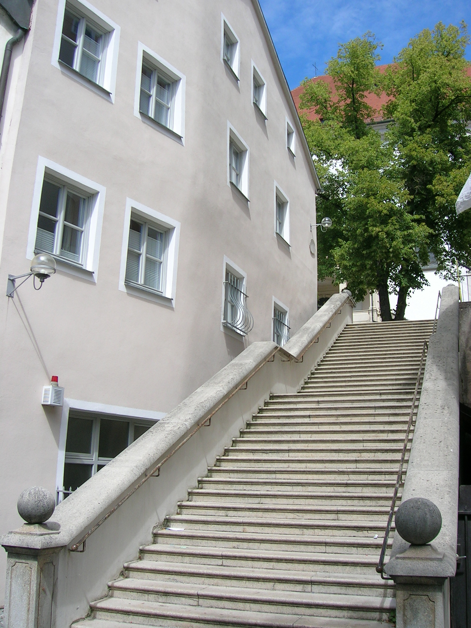 Walburgistiege, Freitreppe zur Kloster- und Wallfahrtskirche St. Walburg, 17. Jahrhundert, von Giovanni Giacomo Engl, 1971/72 erneuert.